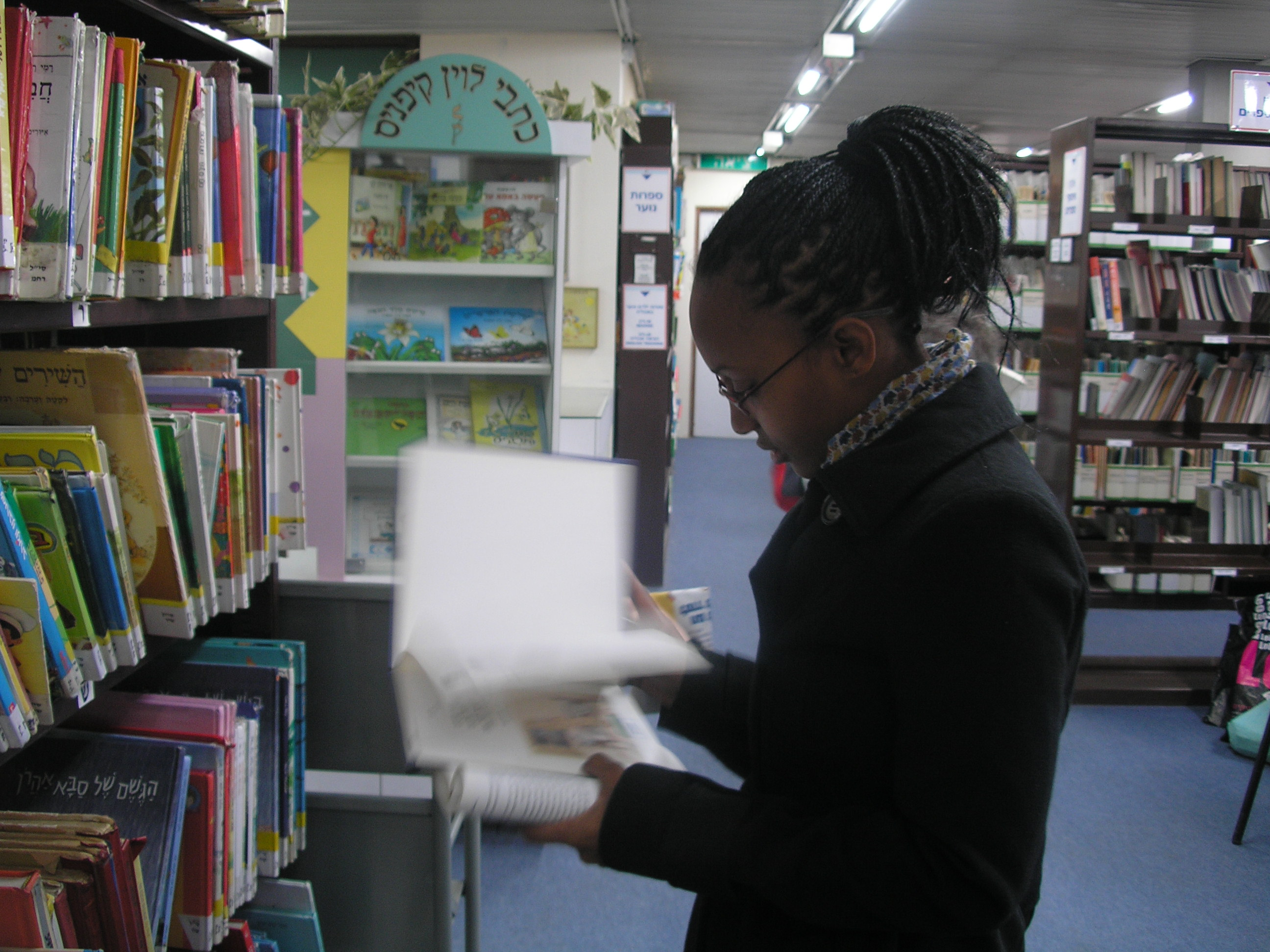 סטודנטית בספריית מכללת לוינסקי לחינוך